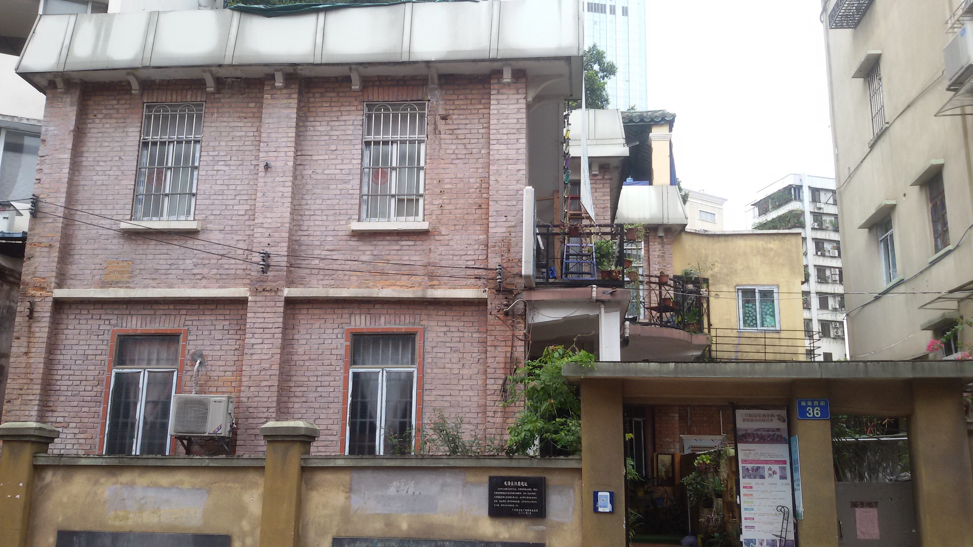 粵語: 毛澤東舊居遺址